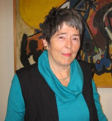 Picture taken of Willemijn Stokvis